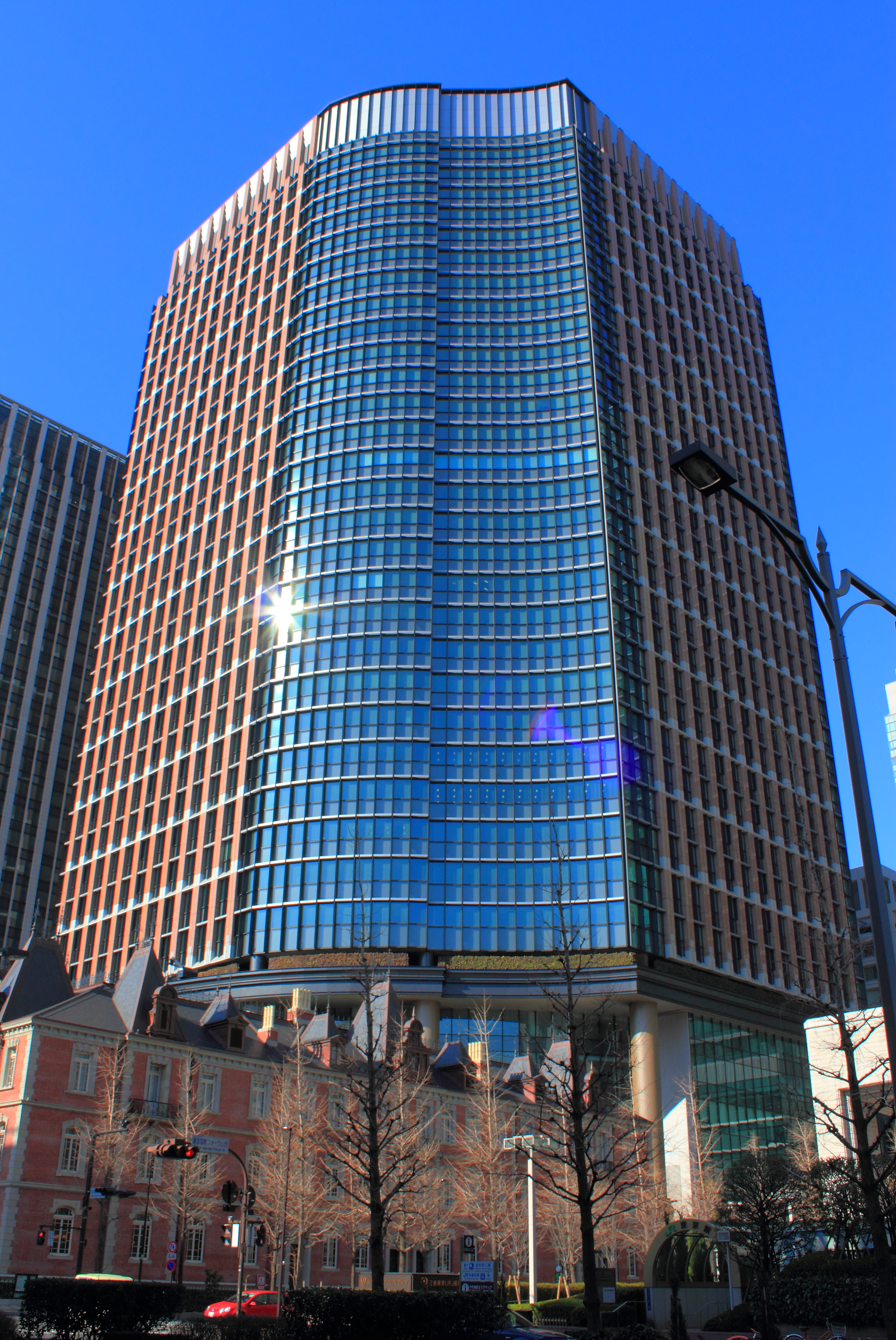 三菱商事本社、新日本製鐵本社。